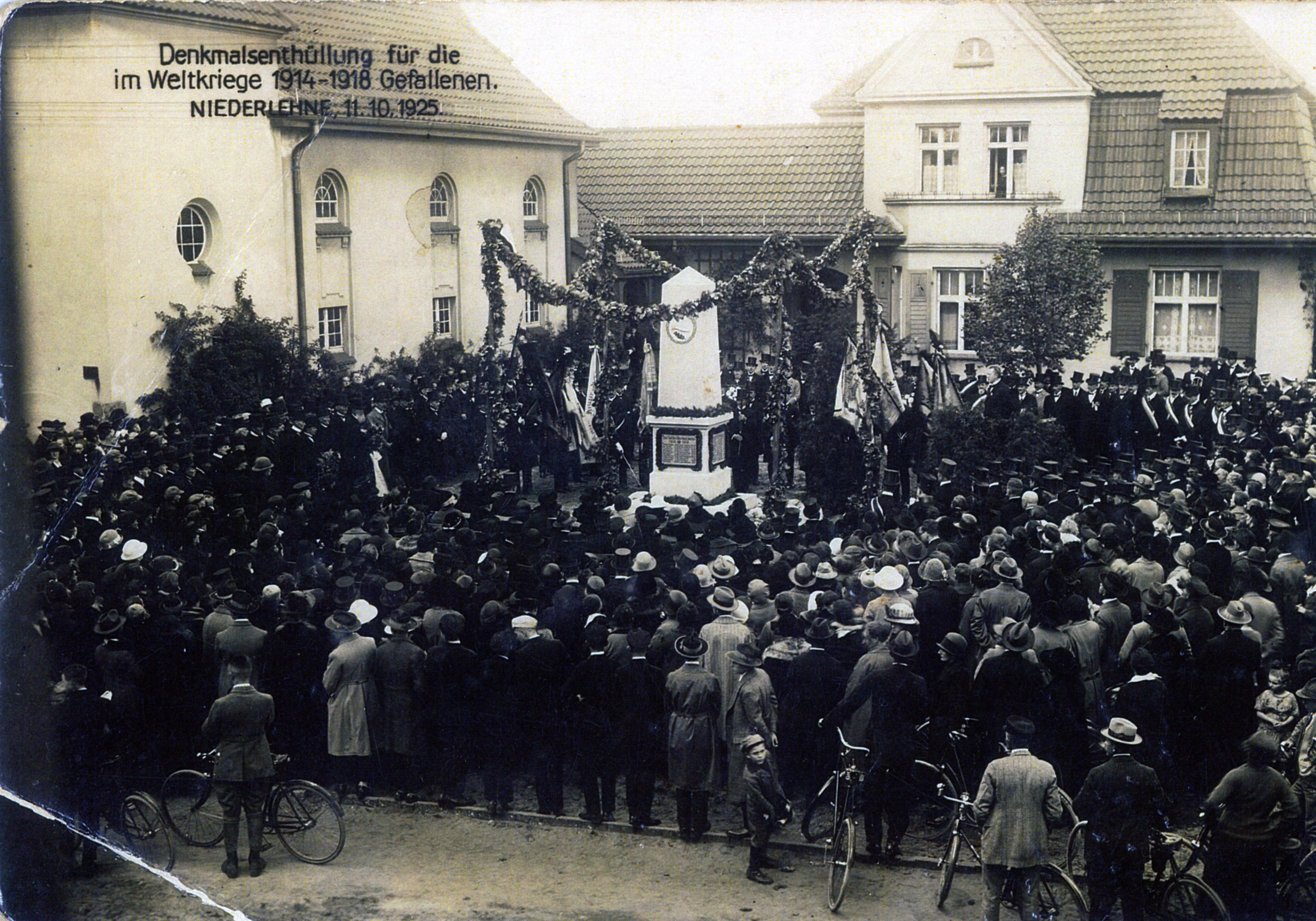 Kriegerdenkmal Niederlehme: Einweihung 1925